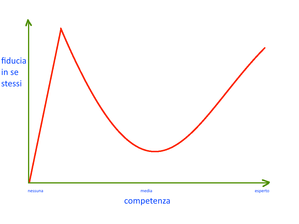 Grafico sull'effetto Dunning-Kruger, che mette in relazione la conoscenza percepita e l'esperienza effettiva - traduzione in italiano delle didascalie in